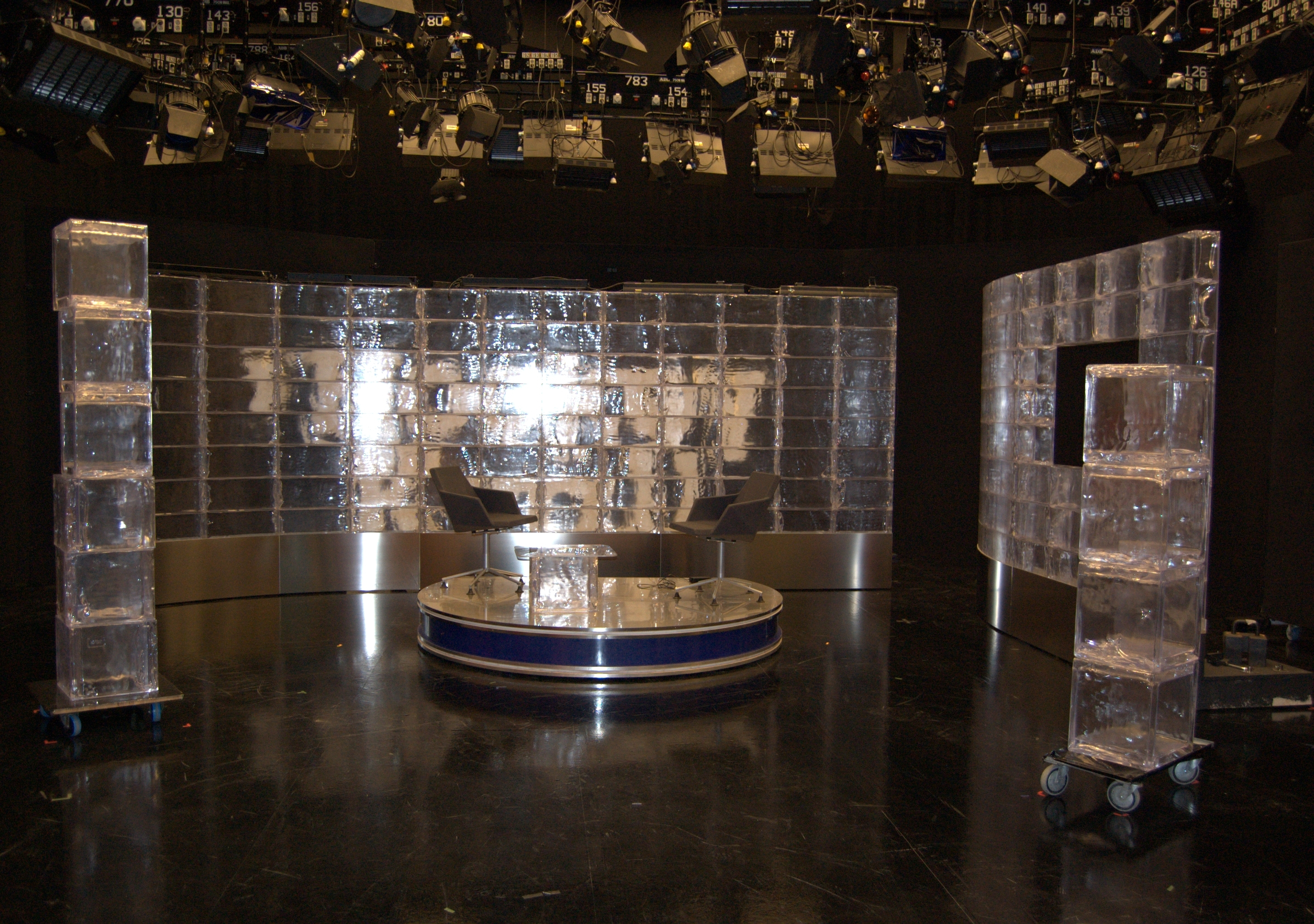 TV-studion där Sveriges Televisions rapporter om Vinter-OS 2010 spelades in.